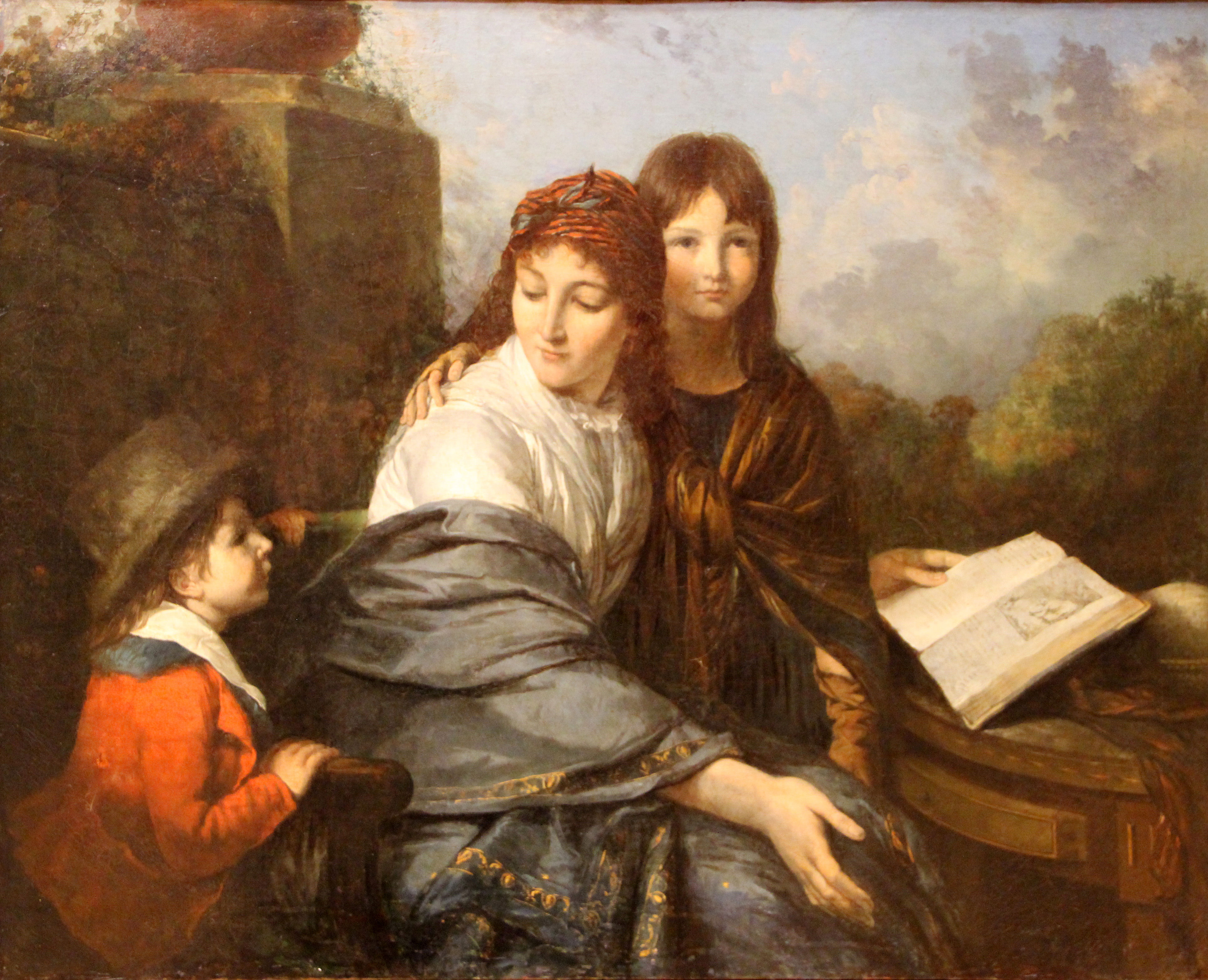 Jean-Pierre Saint-Ours, La lecture de la fable (1796) Huile sur toile 65,3 × 82 cm. Musée d'art et d'histoire de Genève